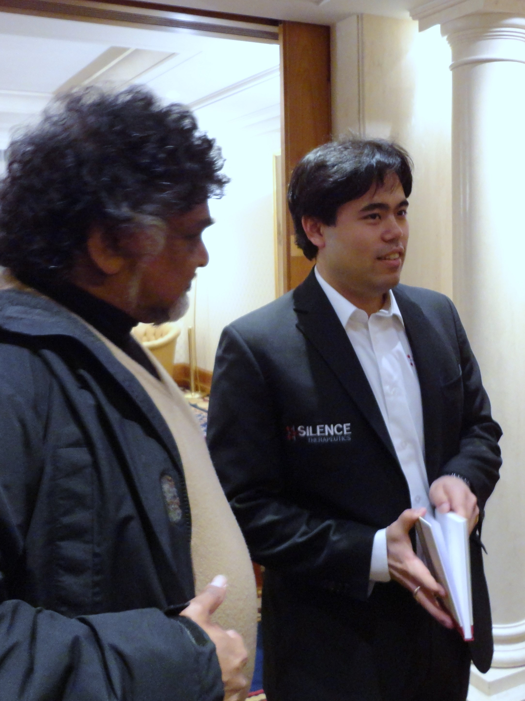 Hikaru Nakamura, ZURICH CHESS CHALLENGE 2014, 4. Februar 2014 in Zürich / Schweiz.